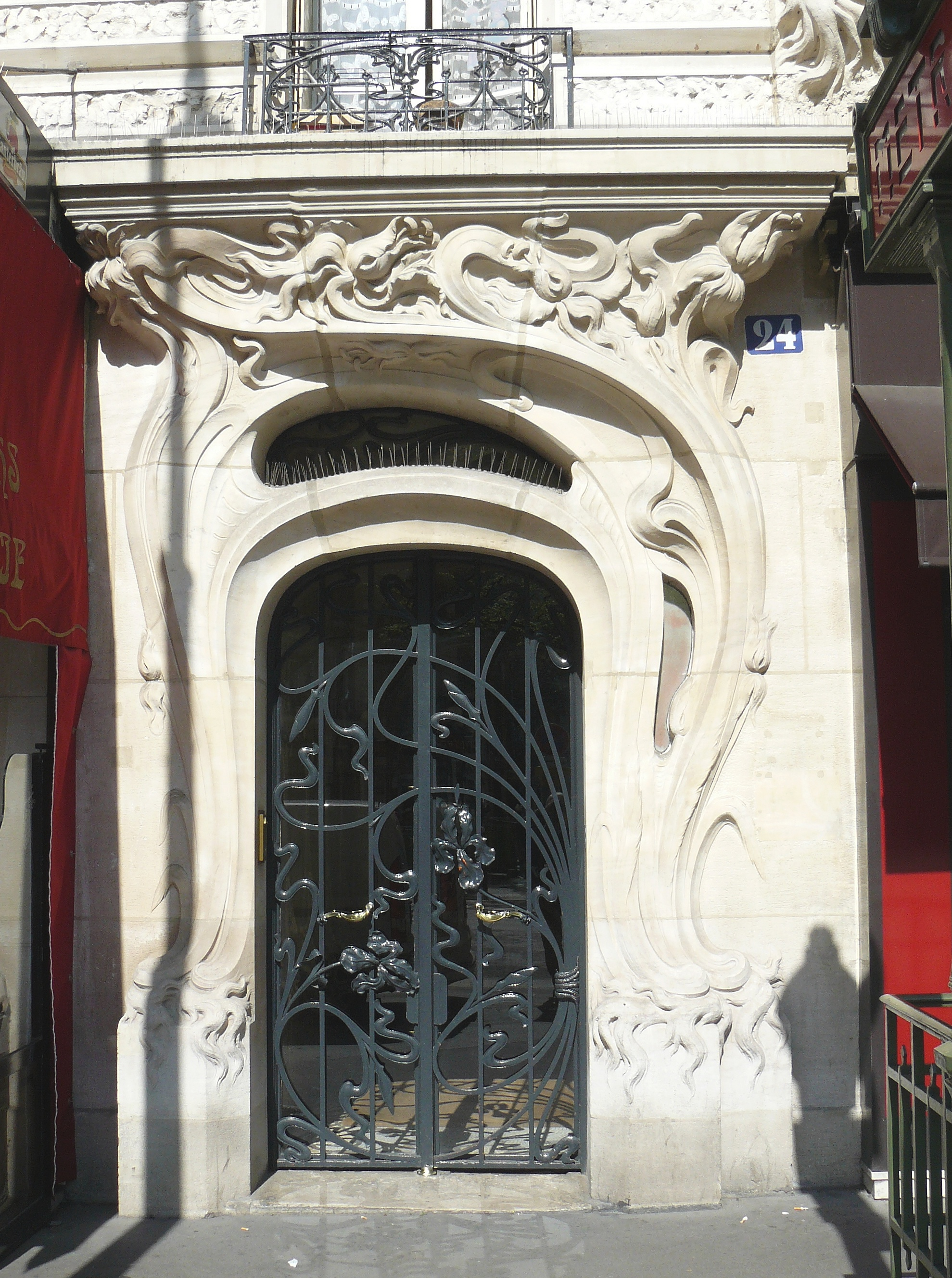 Immeuble en coin, rue de l'église et de la place Etienne Pernet n°24 (Paris 15e arrond.) - Art Nouveau 19O5 - architecte Alfred Wagon - Détail la porte d'entrée au n°24